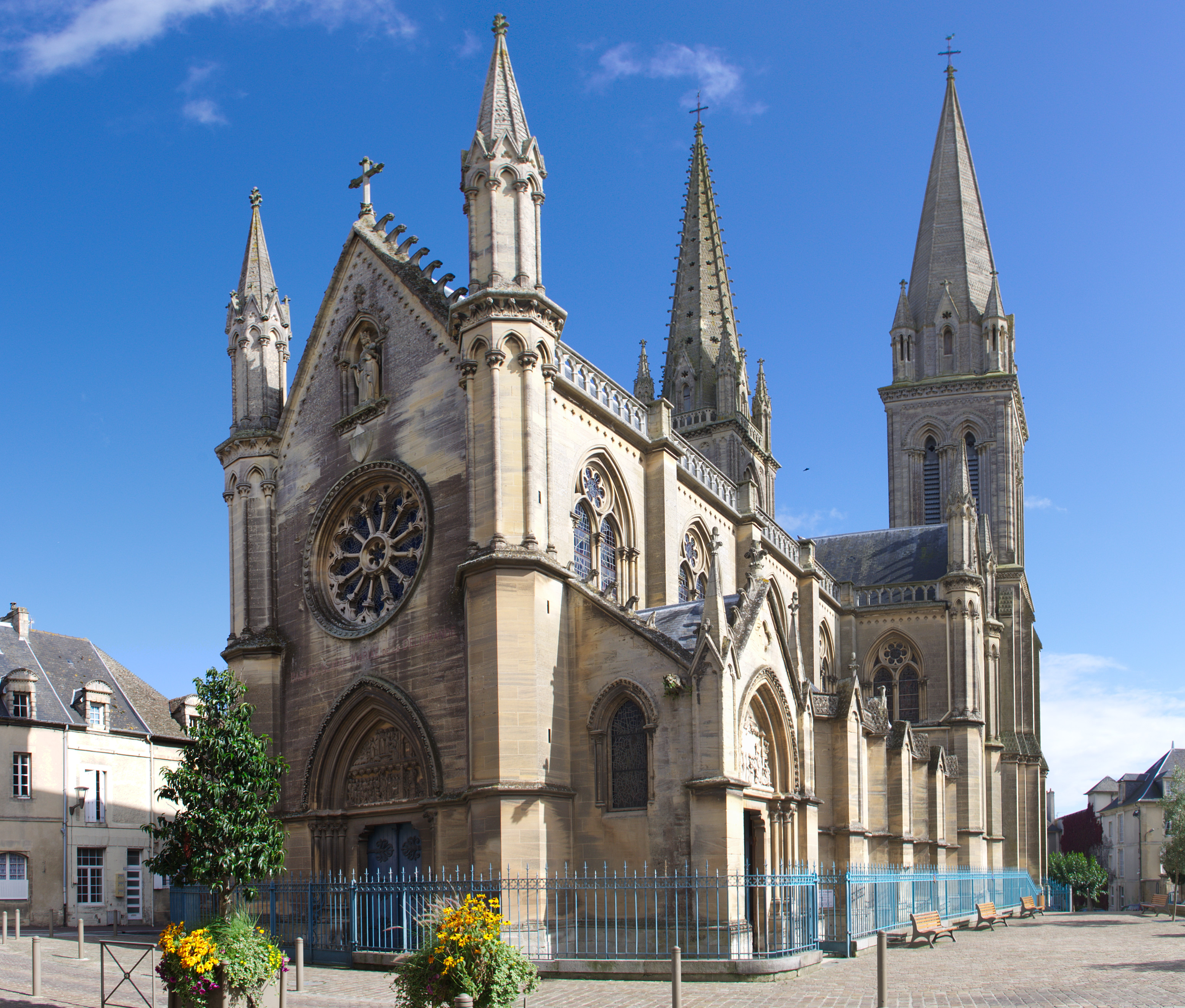 Basilique Notre-Dame de la Délivrande, Douvres-la-Délivrande (France) .